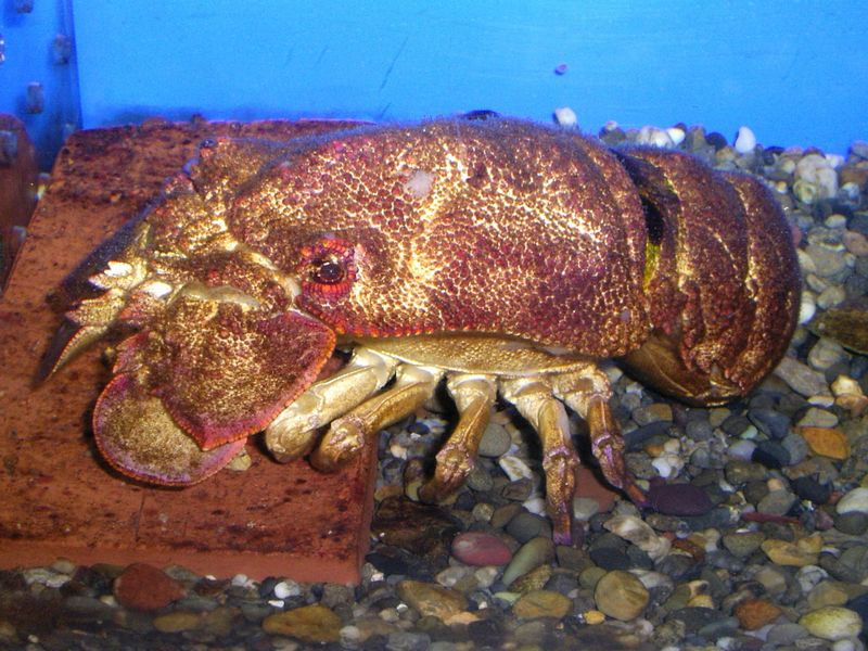 セミエビ, 長崎ペンギン水族館飼育個体 (Scyllarides squammosus, Nagasaki Penguin Aquarium)